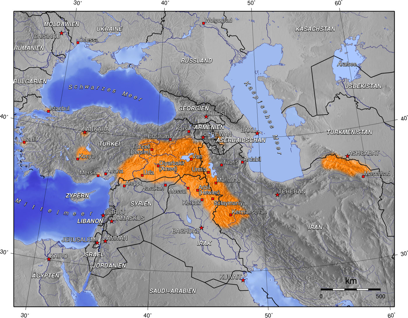 Kurdische Siedlungsgebiete